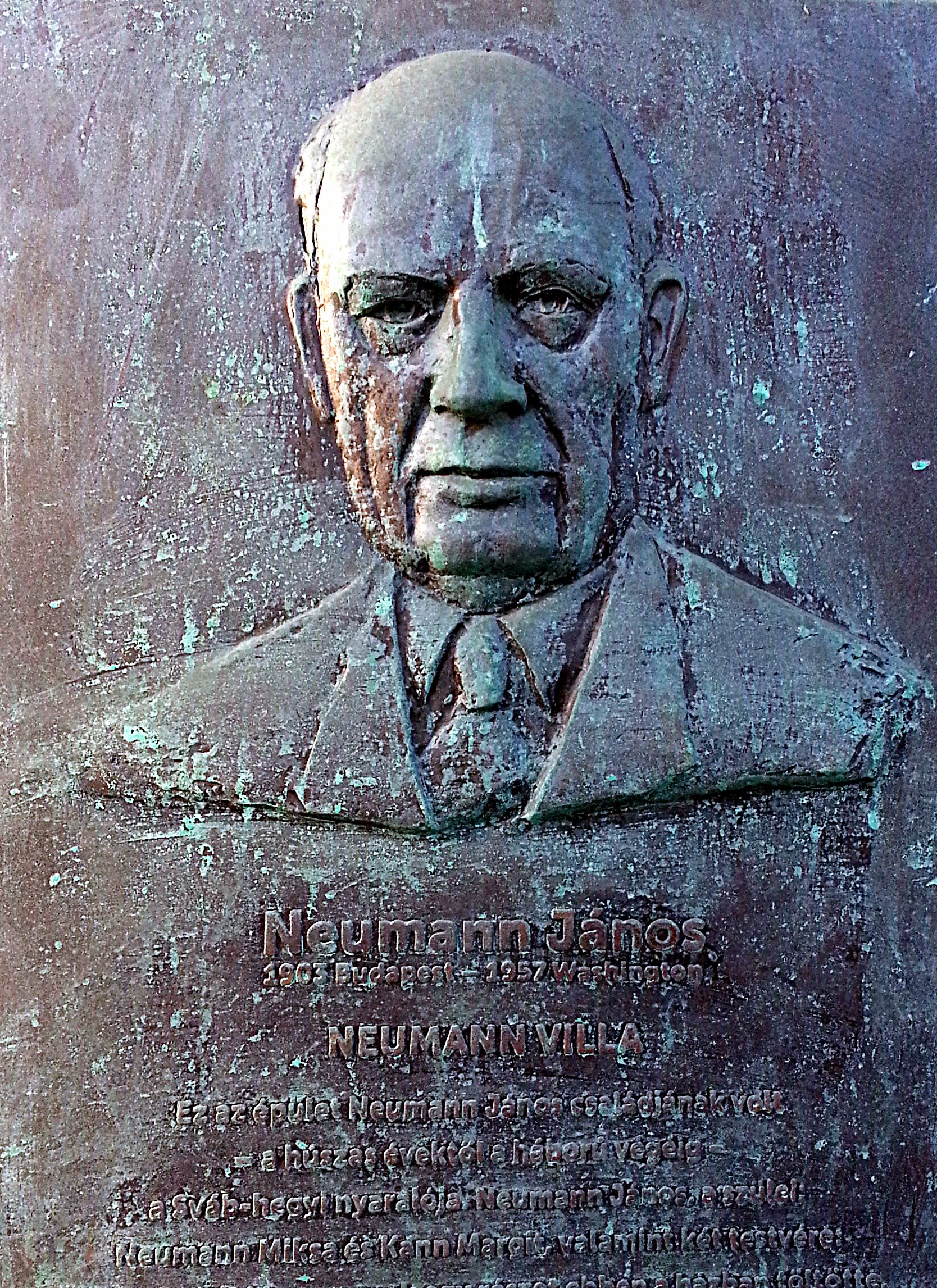 Neumann János emléktáblája (Budapest, XII kerület Eötvös út 13.)